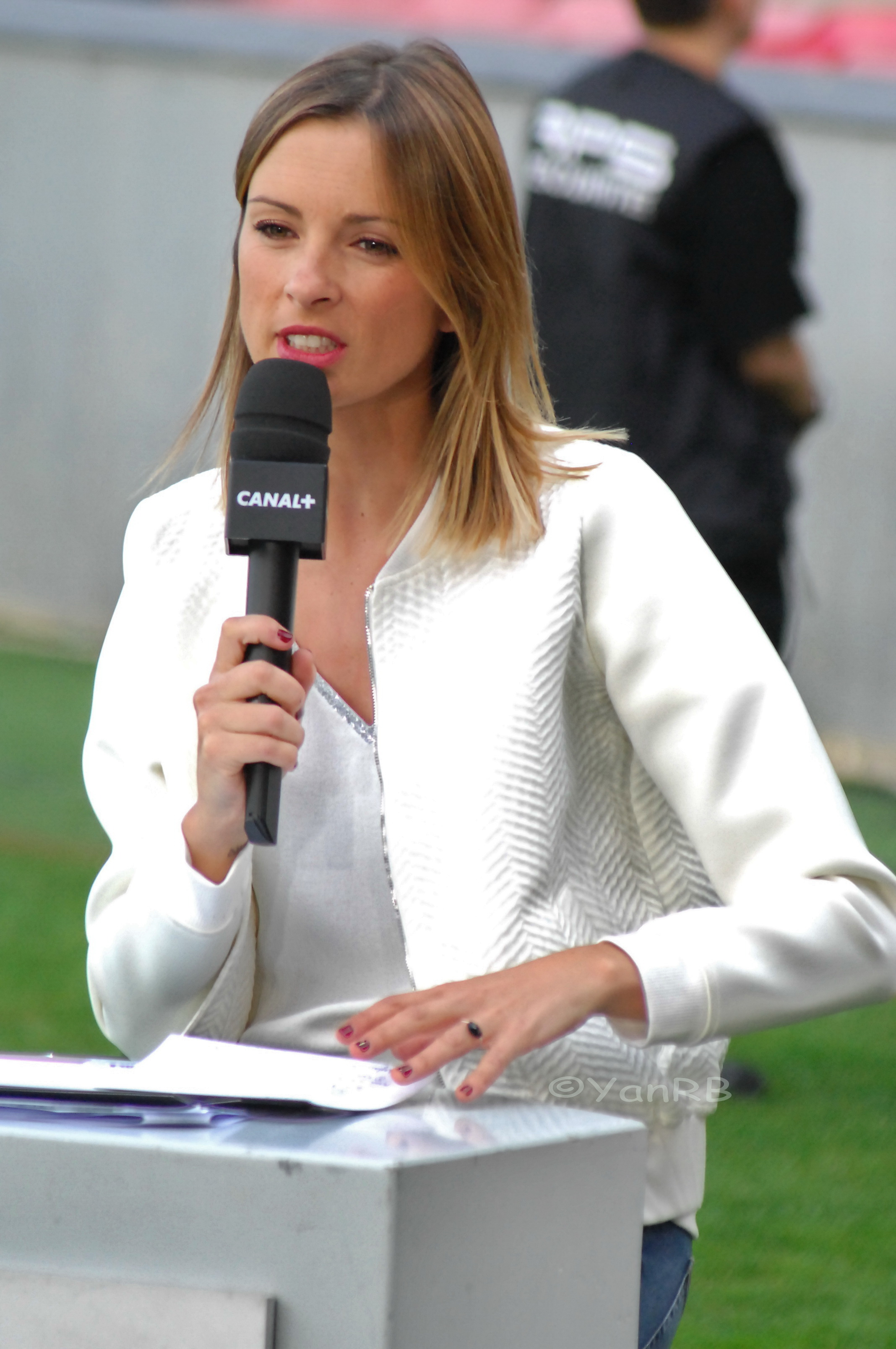 Isabelle Ithurburu au match du Stade Toulousain -Oyonnax 30 mai 2015 pour Canal+